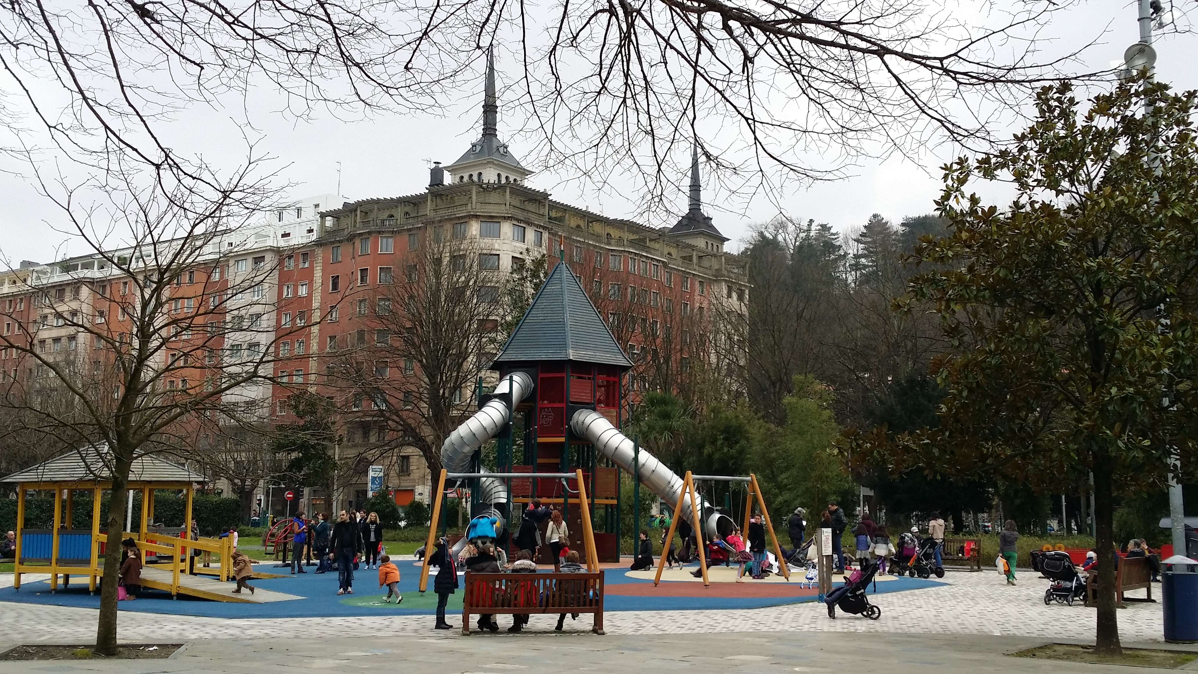 Araba parkea Amaran